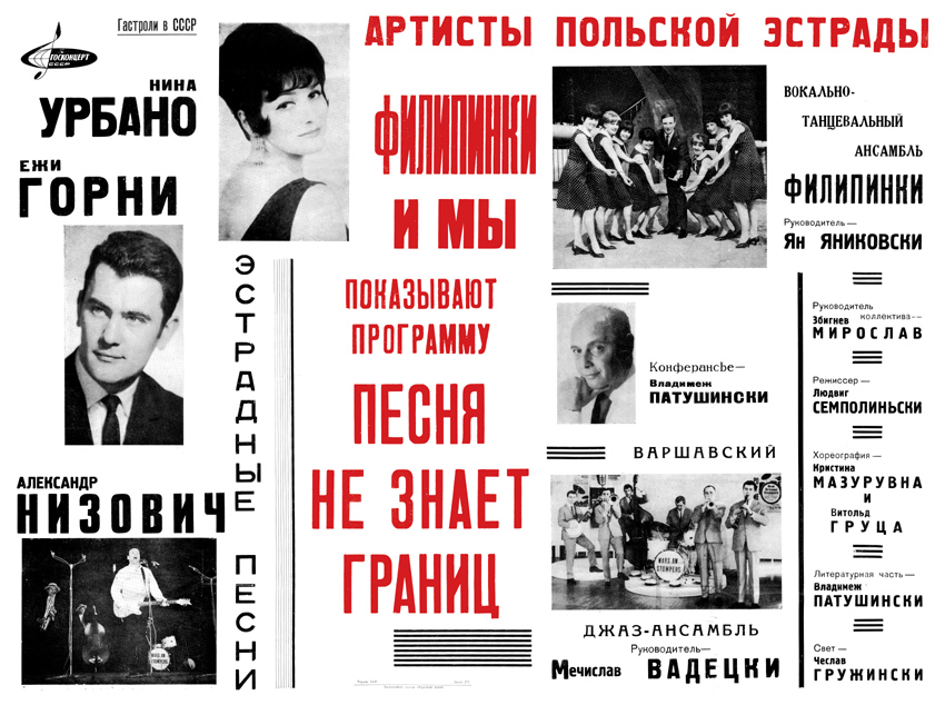 Afisz reklamujący występy Filipinek i towarzyszących im artystów podczas trasy koncertowej po ZSRR w 1967 r.